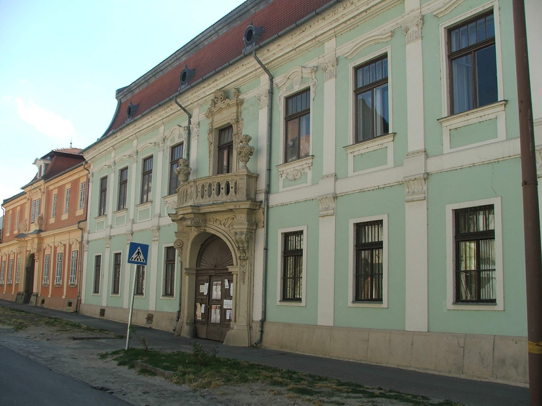 Bottyán street in Esztergom